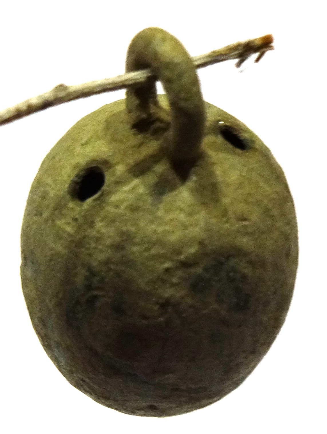 römischer Parfümanhänger aus Bromze, ca. 2,8 cm hoch